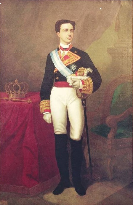 Retrato del rey Alfonso XII de España (1857-1885), vestido con uniforme de capitán general y portando el collar de la Orden del Toisón de Oro y la banda de la Orden de Carlos III.